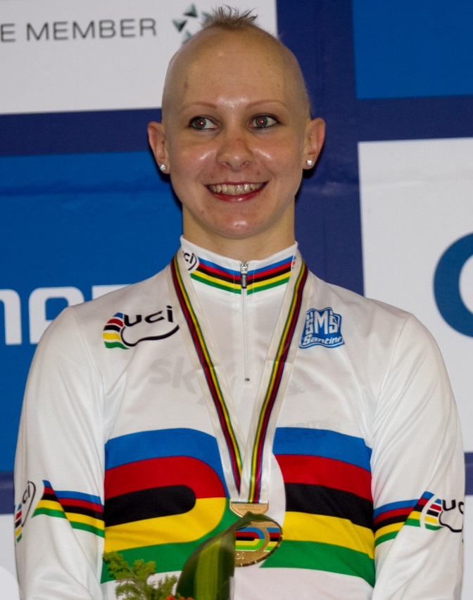 Joanna Rowsell en el Campeonato Mundial de Ciclismo en Pista de 2014.